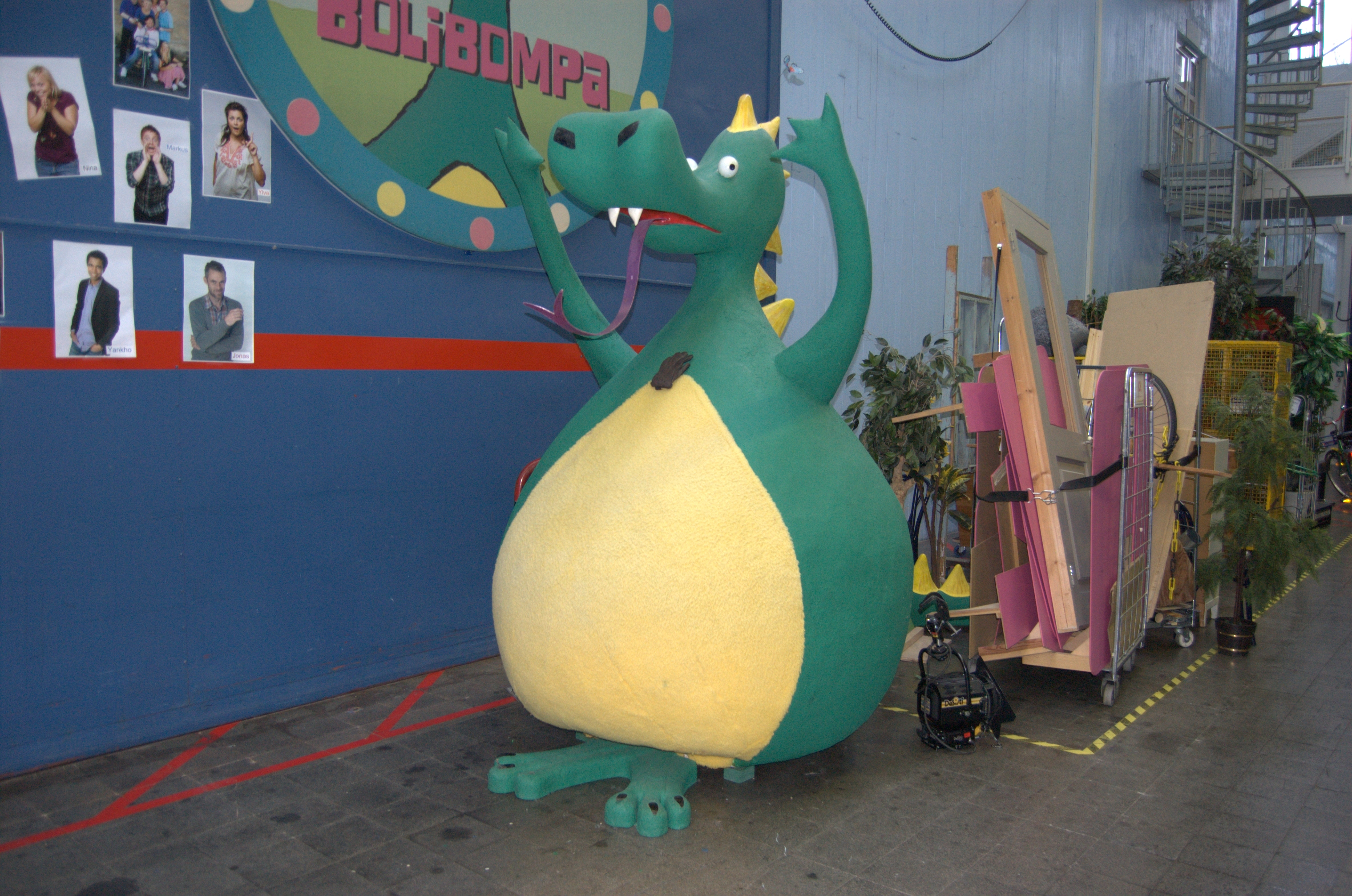 En tre meter hög papier mache-drake som används som personifiering av Bolibompa, Sveriges Televisions barnprogram. Statyn står i SVT:s lokaler, tio meter från Bolibompastudion, i Stockholm.